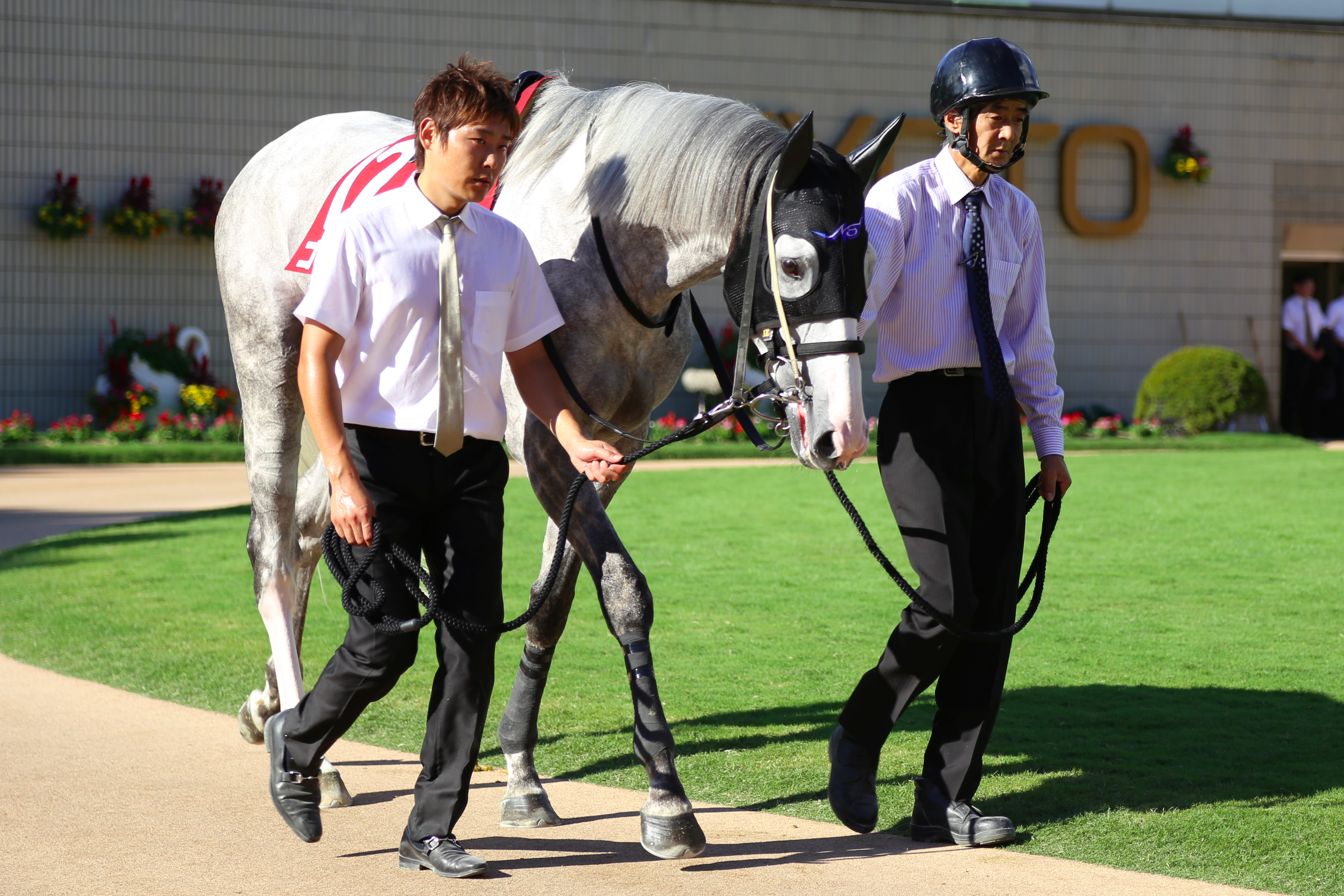 2013年京都大賞典でのゴールドシップ